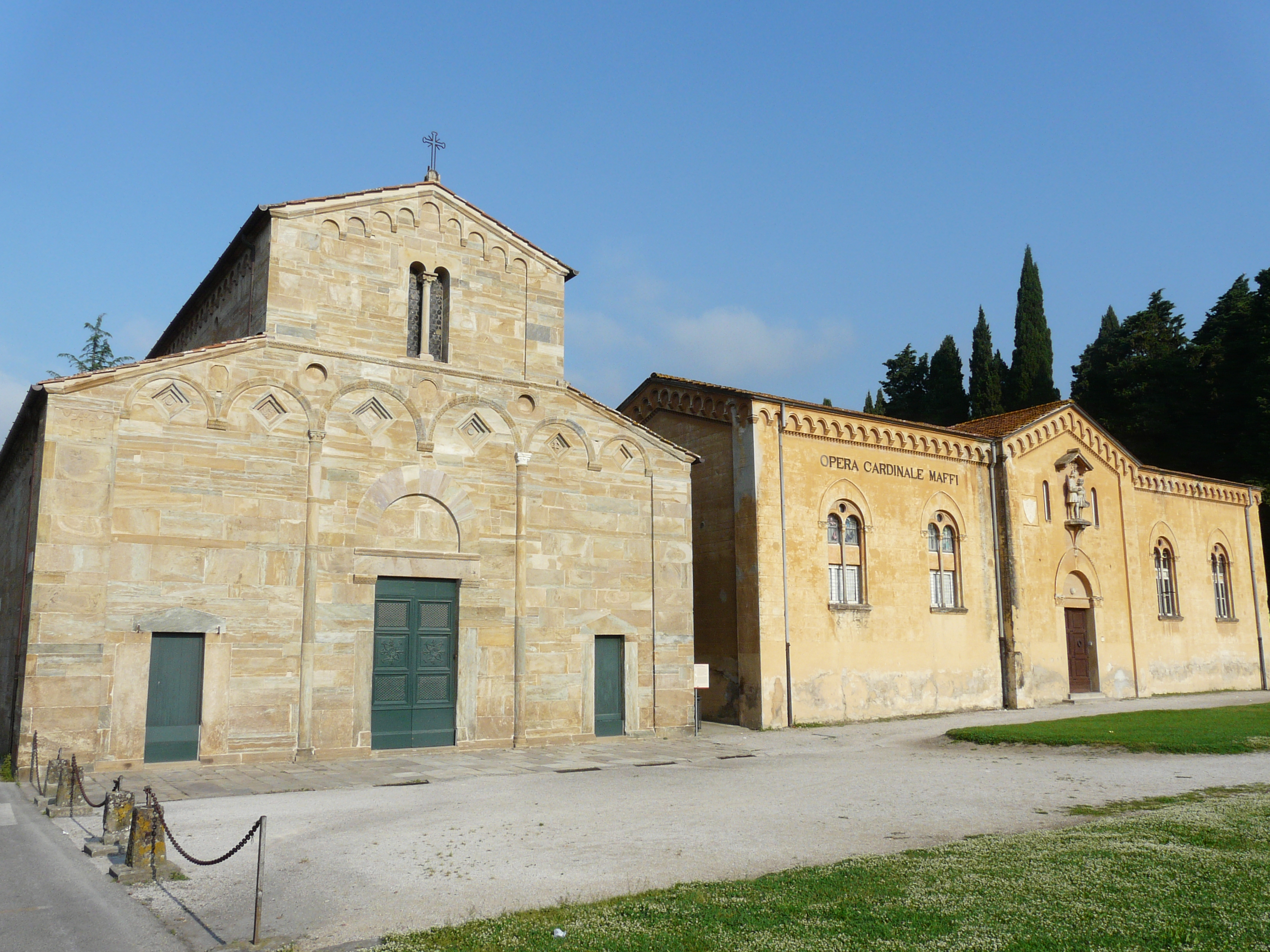 Pieve di Santa Maria Assunta, Comune di Vicopisano, Toscana, Italia